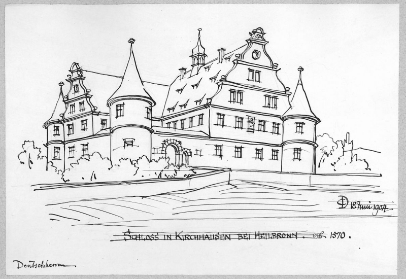 s.o.